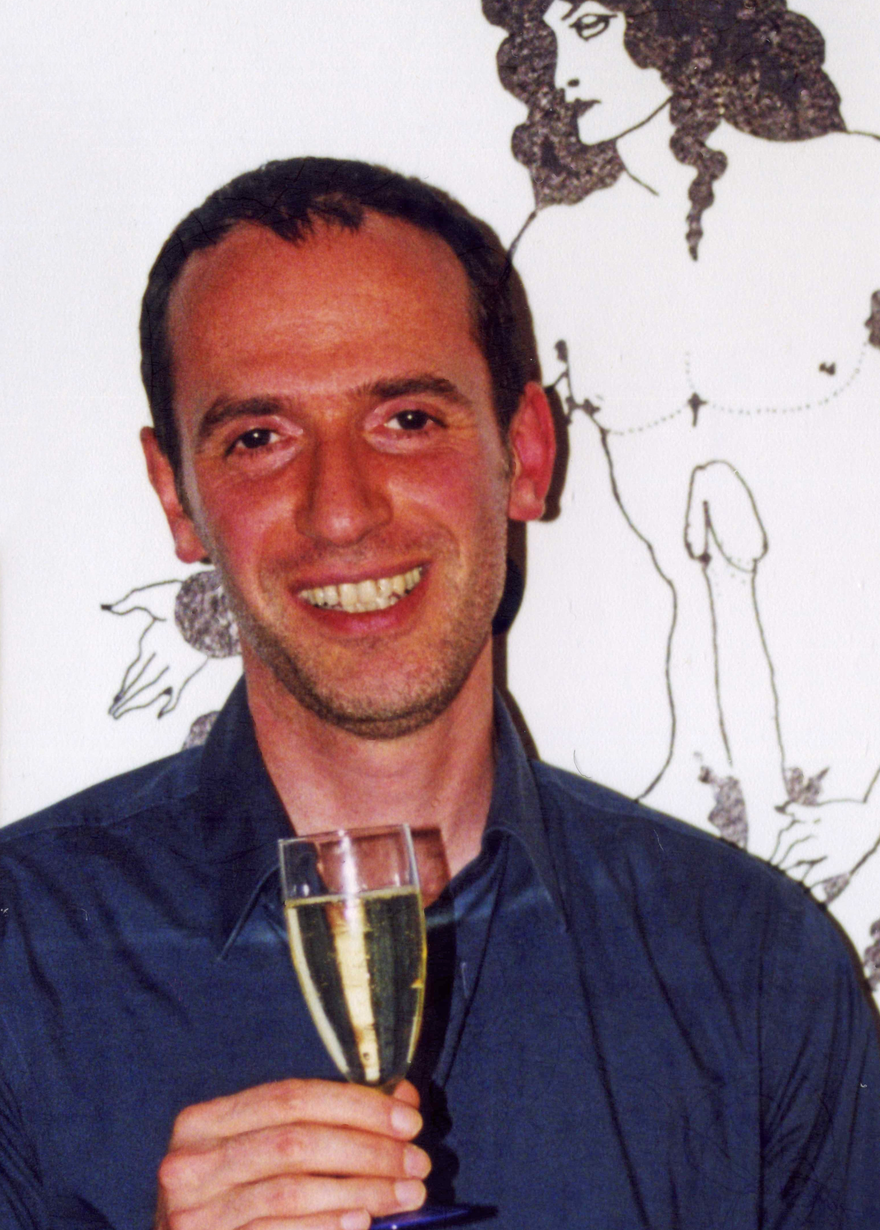 Andreas Sternweiler bei einer Vernissage im Schwulen Museum